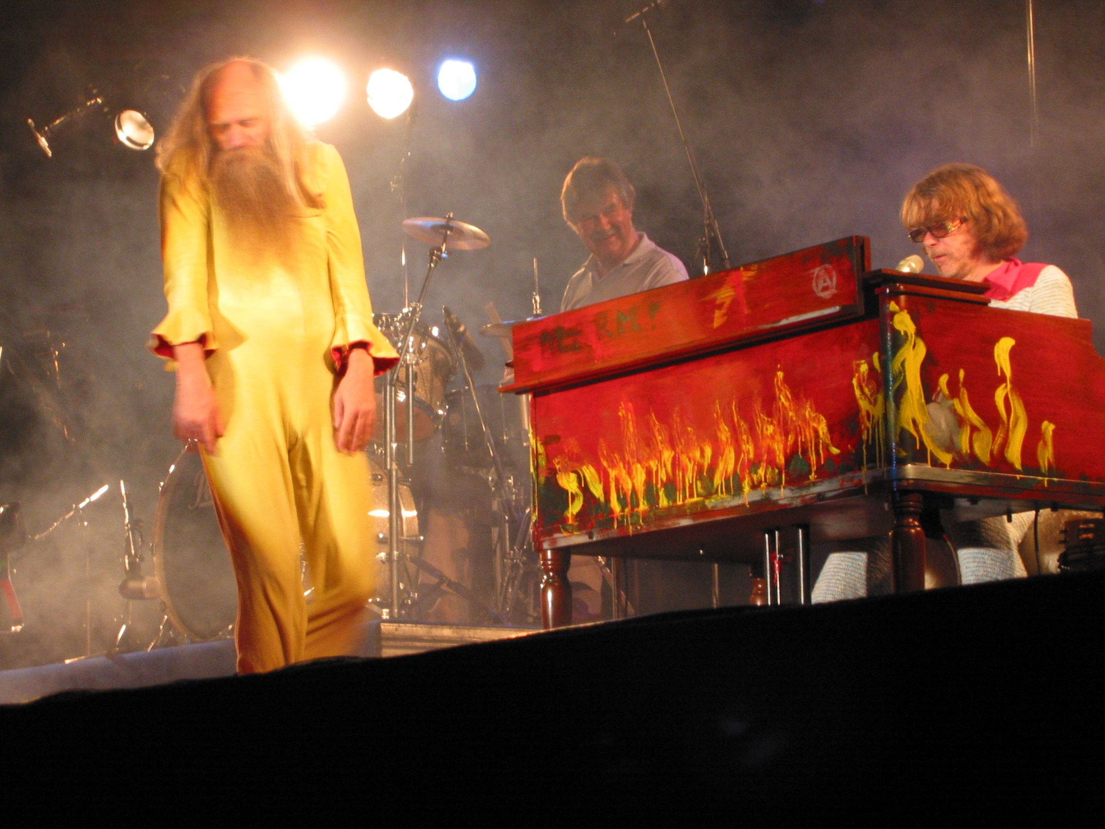 Helge Schneider während seiner Tournee "Kampf in Weltall" 2005 zusammen mit Pete York und Sergej Gleithmann